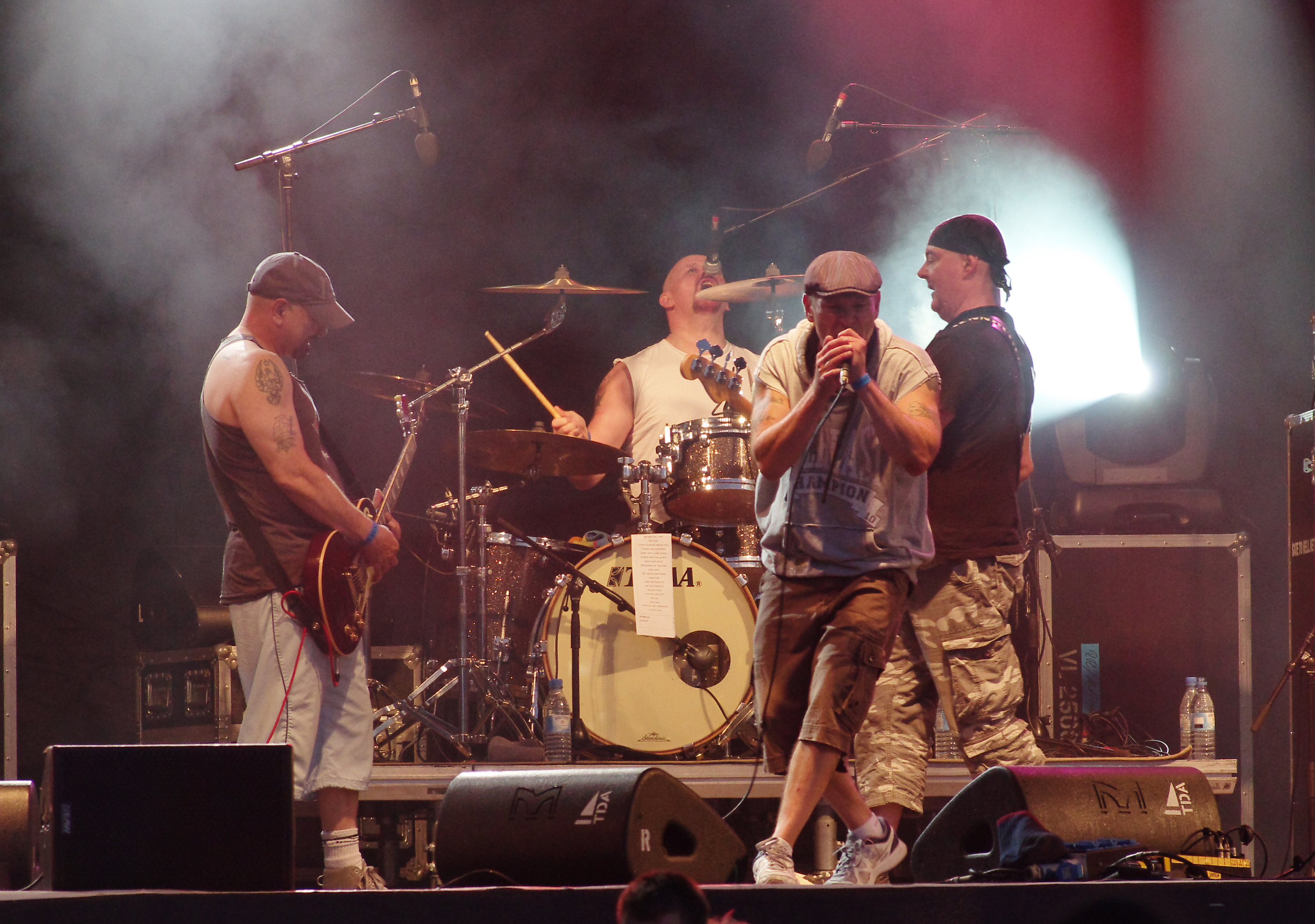 Cockney Rejects beim Ruhrpott Rodeo 2013 in Hünxe.